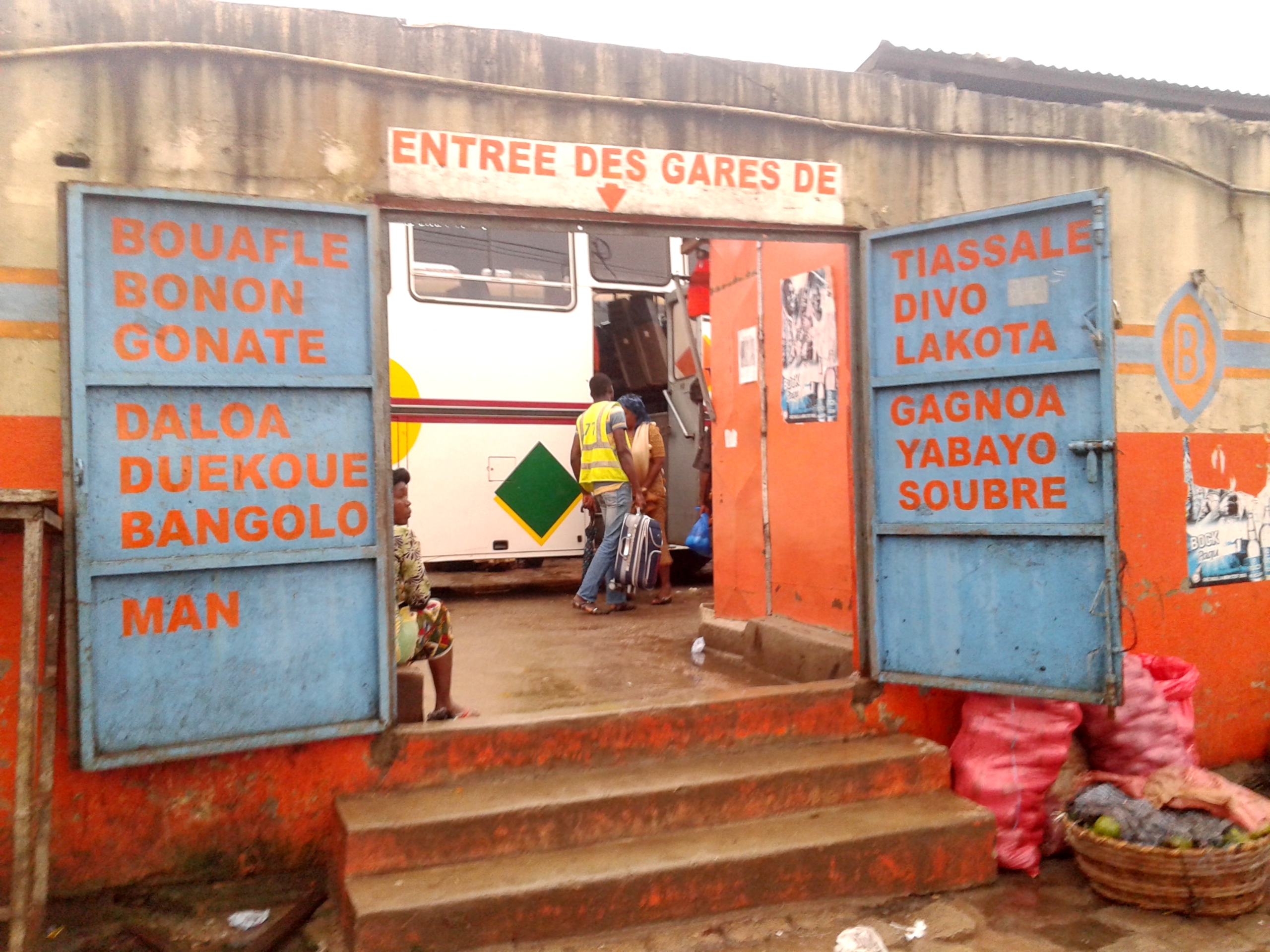 Gare UTB, Abidjan, Côte d'Ivoire.